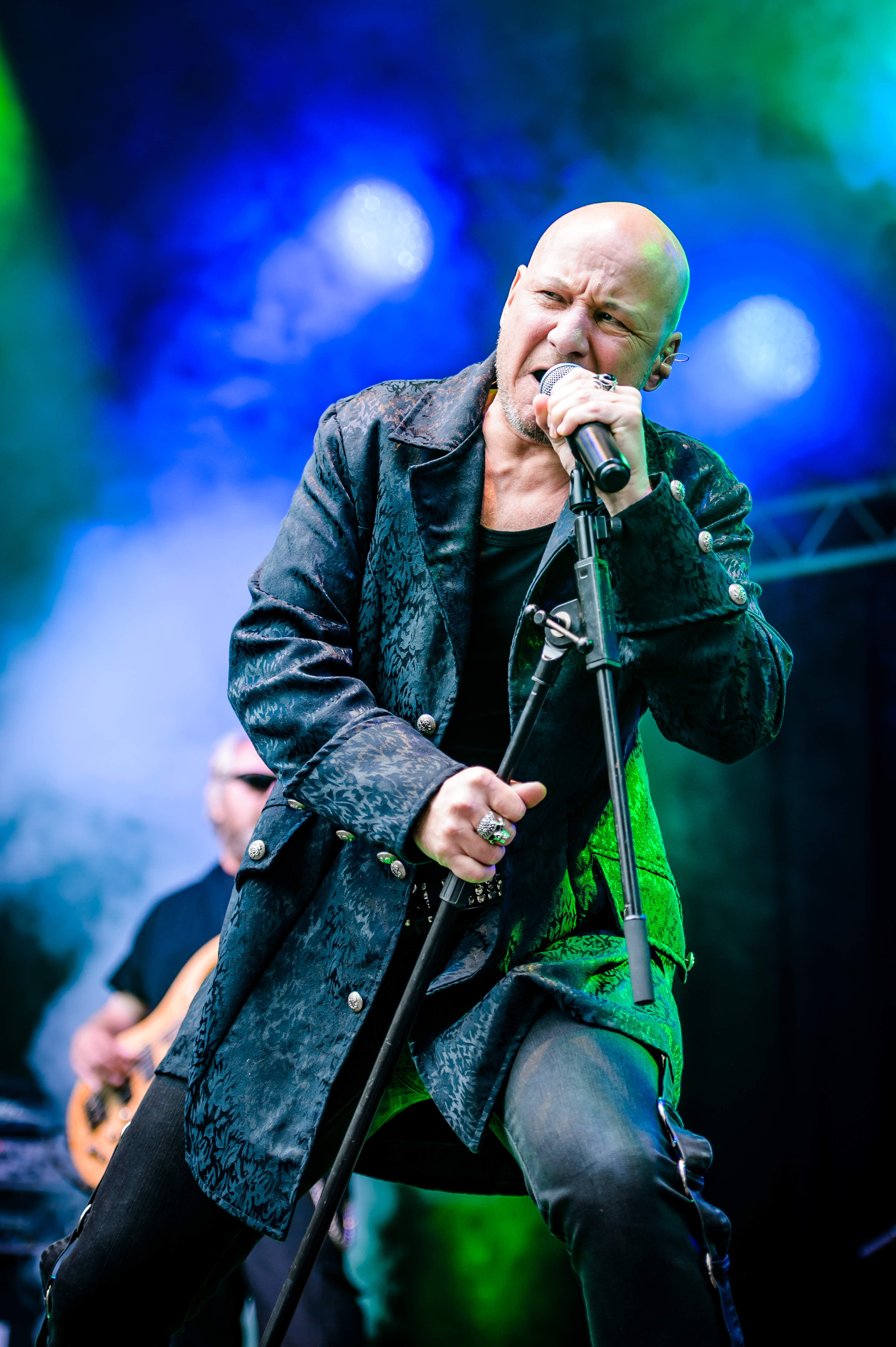 'Castle Rock 2017; Mülheim an der Ruhr': 'Hemesath'